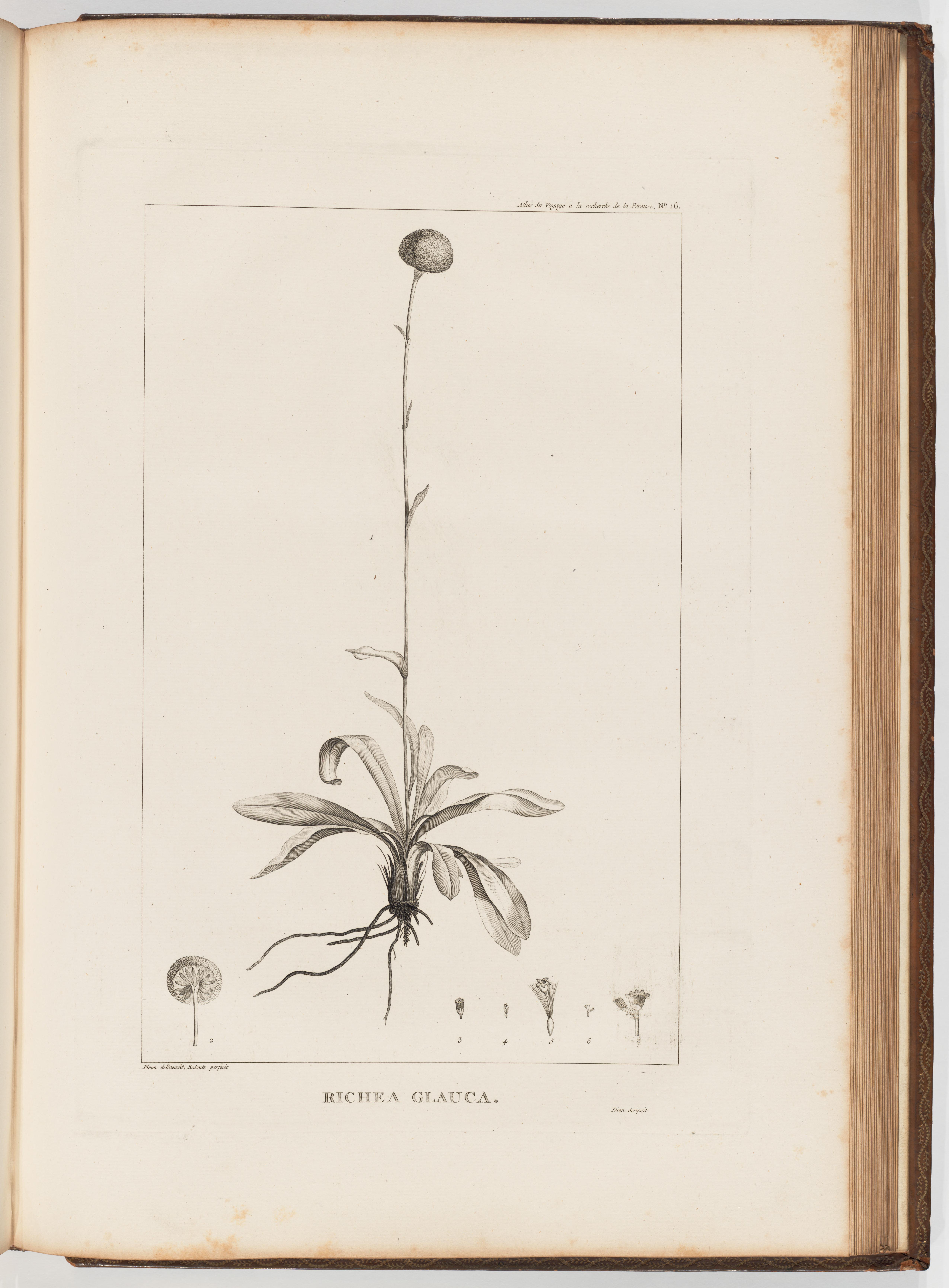 Voyage de La Pérouse autour du monde /publié conformément au décret du 22 avril 1791, et rédigé par L.A. Milet-Mureau ː Craspedia glauca.